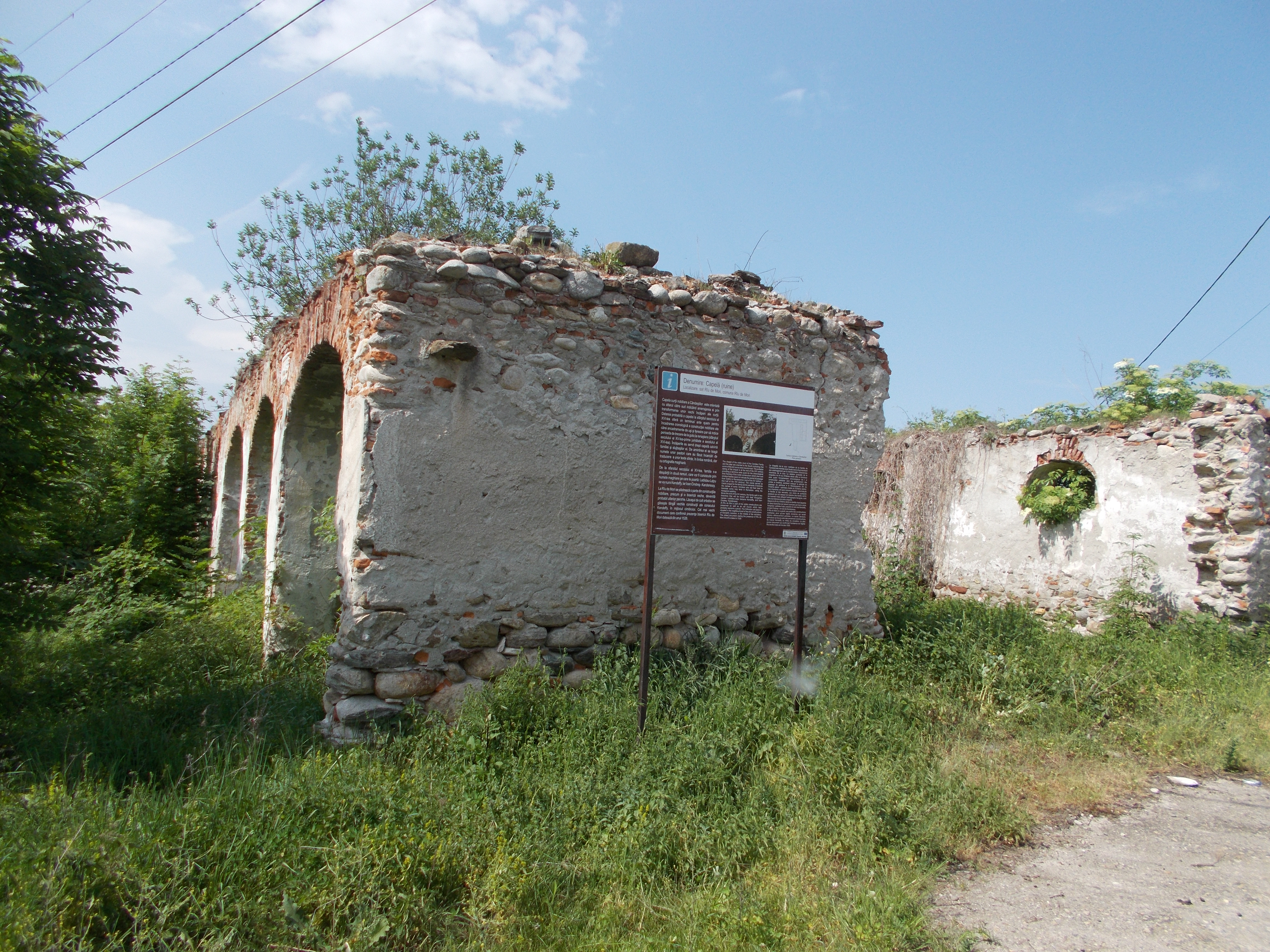 Curtea nobiliară a Cândeștilor (Capelă), Râu de Mori, Hunedoara 02